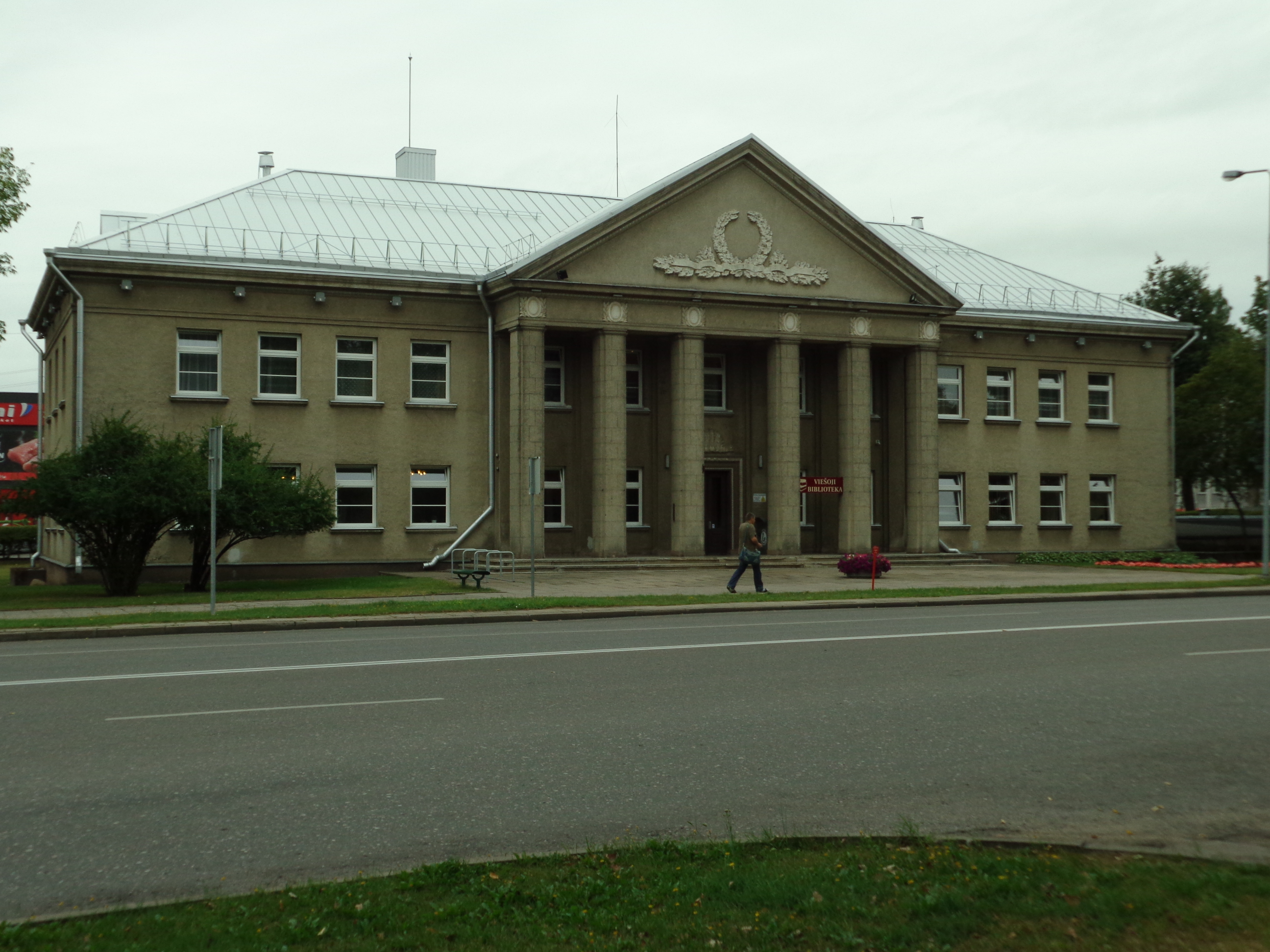 Jonavos Viešoji Biblioteka, 2014